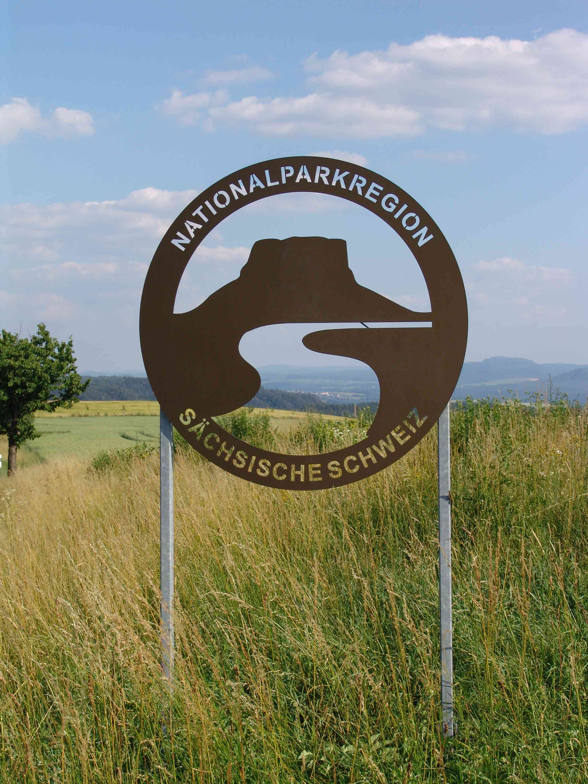 Schild der Nationalparkregion Sächsische Schweiz